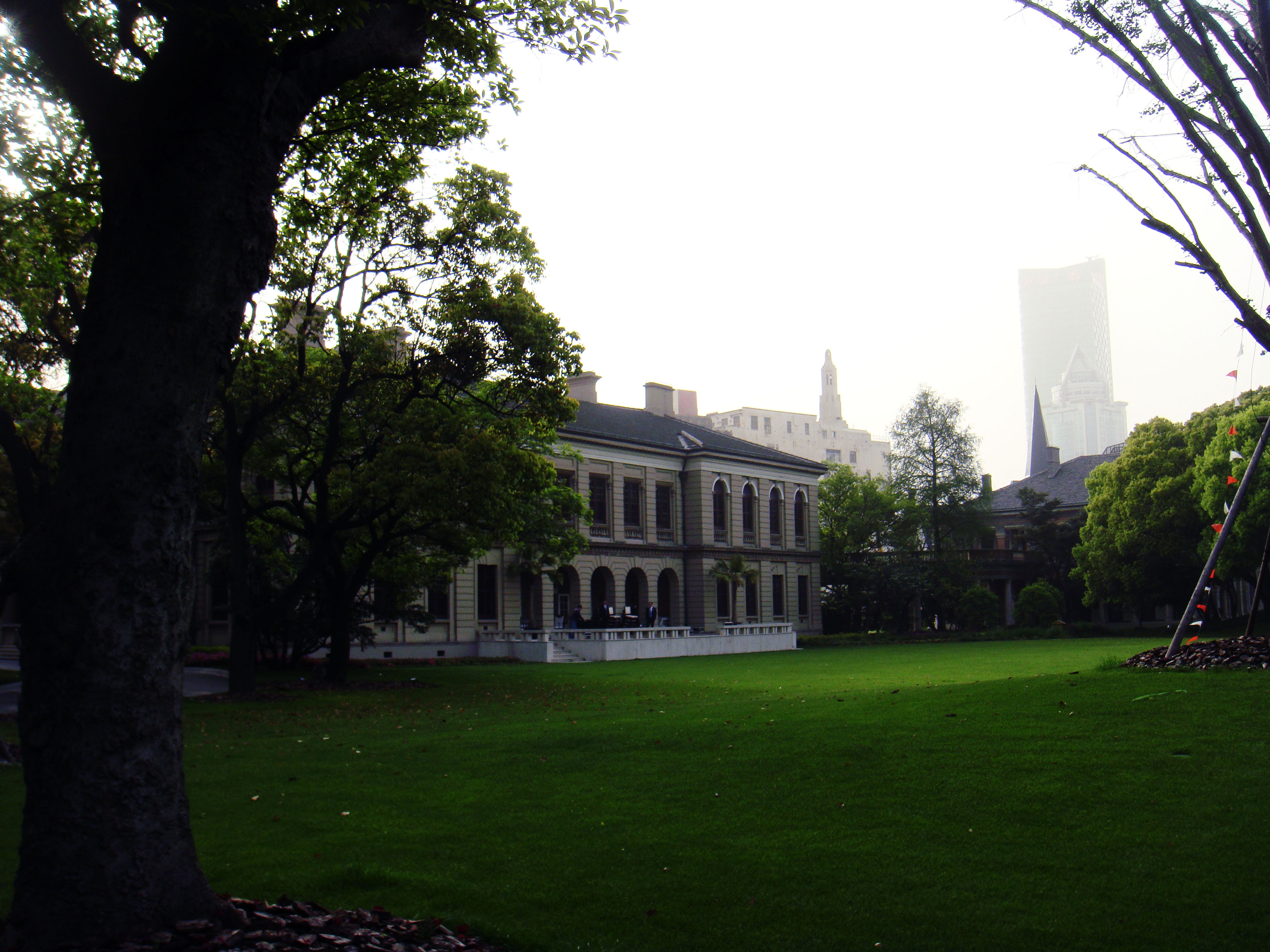 原联合王国驻上海总领事馆